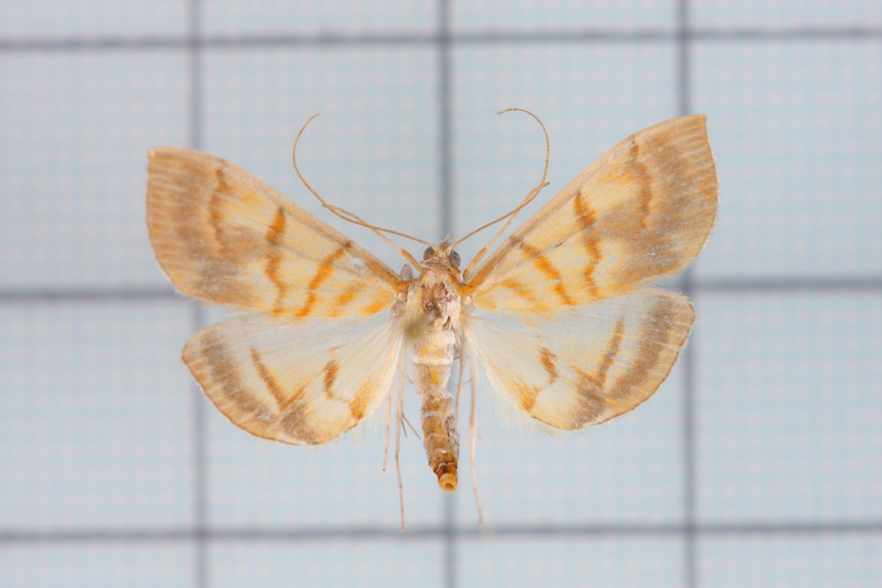 Pagyda nebulosa Wileman & South, 1917 認識台灣的昆蟲 19 螟蛾總科 :P.290 female